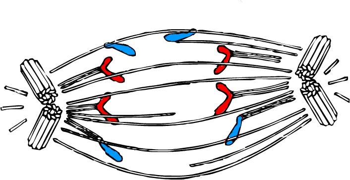 Anaphase de la mitose cellulaire au niveau des chromosomes